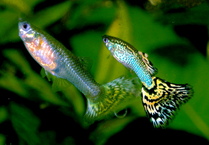 Male and female guppies (Poecilia reticulata)